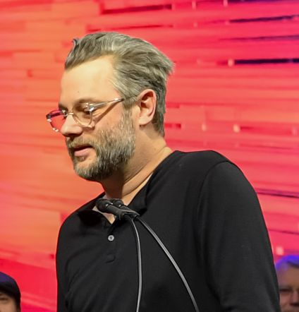 1D5_5847